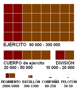 Estructura de Ejercito